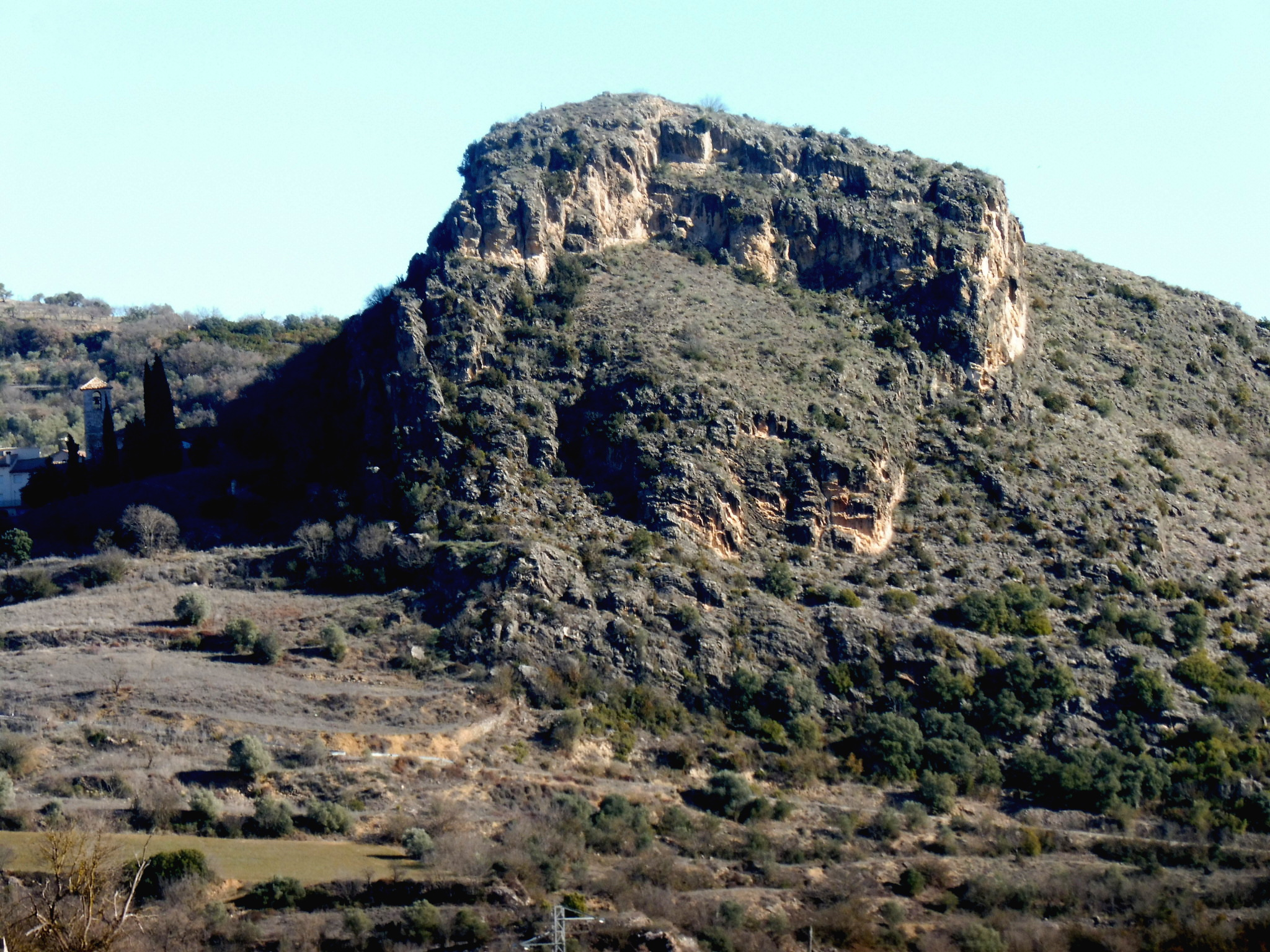 Puig del castell de Santa Linya (les Avellanes i Santa Linya)